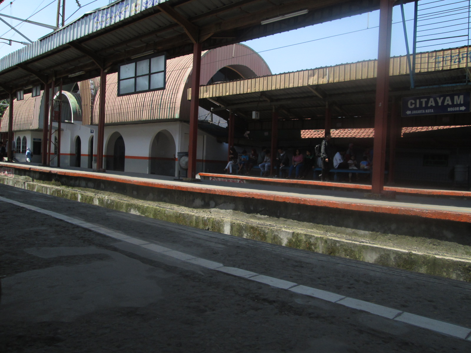 Stasiun Citayam